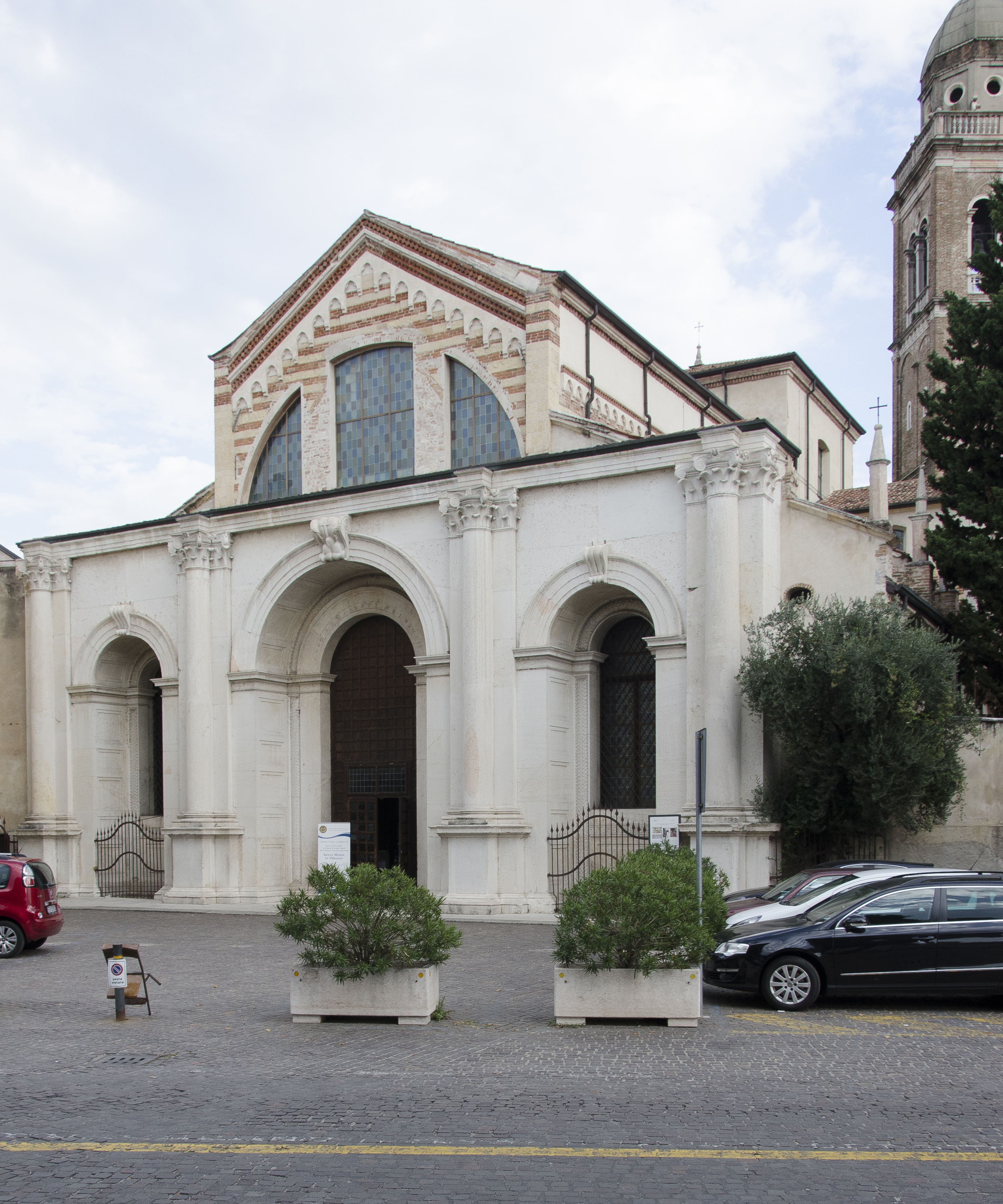 Facciata